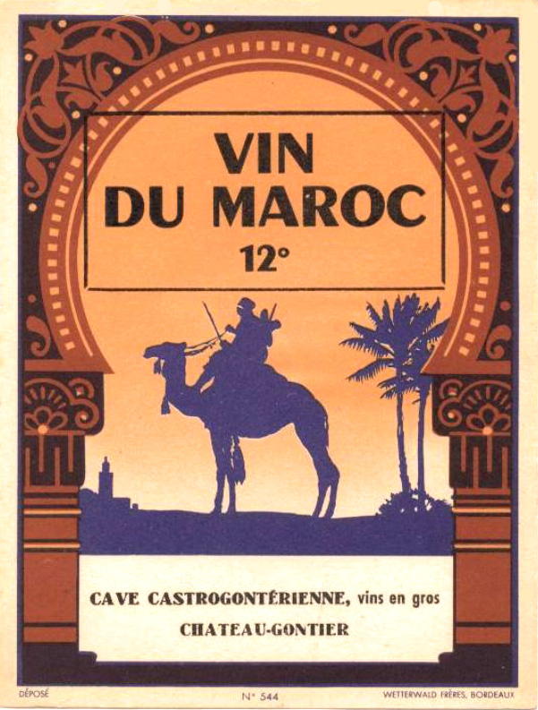 Étiquette de vin du Maroc imprimé par les frères Wetterwald de Bordeaux pour la Cave Castrogontérienne